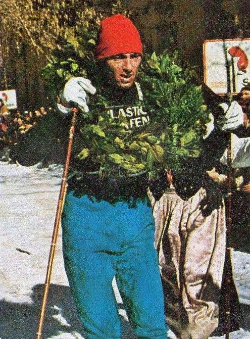 CAMPIONI dello SPORT 1973/74-Figurina n.349- SIITONEN - FINLANDIA -FONDO-Rec